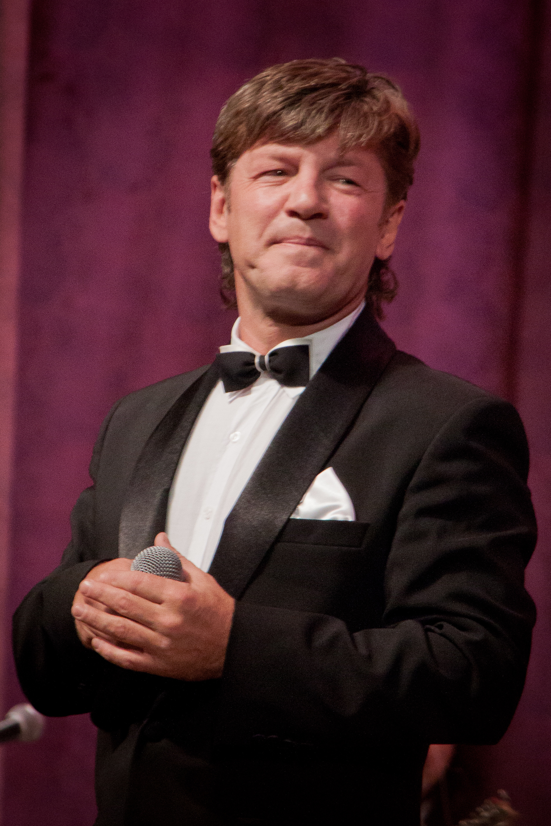 Певец Феликс Царикати